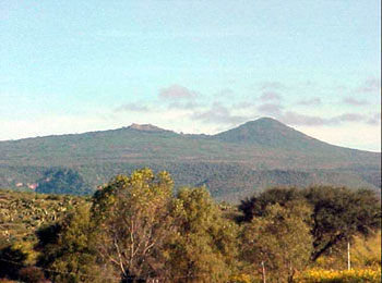 San miguel